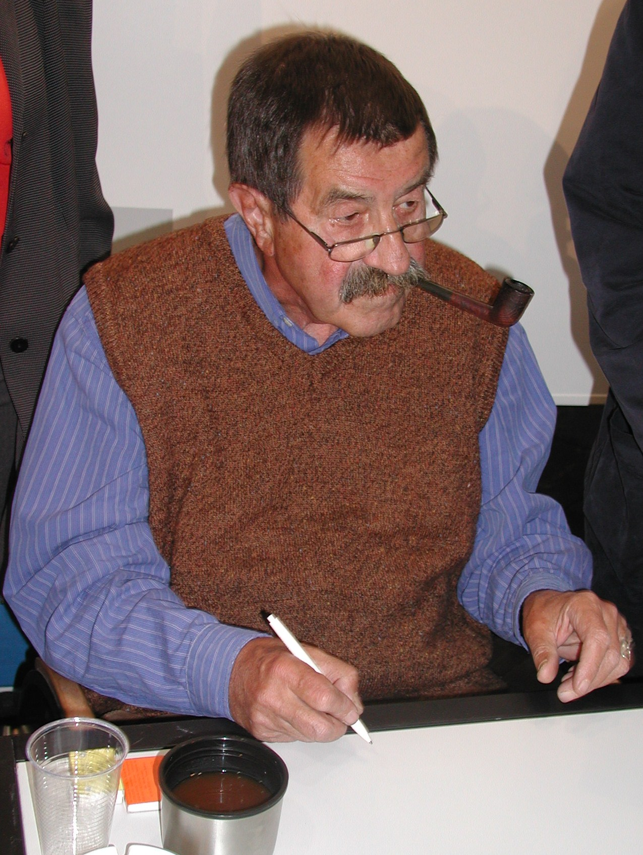 Dieses Fotos dürfen Sie honorarfrei nutzen, wenn Sie folgenden credit beachten: Copyright: Das blaue Sofa / Club Bertelsmann. Günter Grass wurde am 16. Oktober 1927 in Danzig als Sohn einer Kaufmannsfamilie geboren. Er studierte Bildhauerei an der Düsseldorfer Kunstakademie und an der Hochschule für Bildende Künste Berlin. Ab 1955 nahm er regelmäßig an den Tagungen der Gruppe 47 teil. 1956 erschien sein erstes Buch, der Gedichtband „Die Vorzüge der Windhühner“. Mit dem Roman „Die Blechtrommel „ wurde er 1959 schlagartig berühmt: Neben seinen Romanen (Hundejahre, örtlich betäubt, Der Butt, Die Rättin, Ein weites Feld u.v.a.) entstehen Gedichtbände (Gleisdreieck, Ausgefragt, Letzte Tänze u.a.), Kurzprosa, Theaterspiele, Essays, Novellen (Katz und Maus, Im Krebsgang), Erzählungen (Das Treffen in Telgte, Unkenrufe, Aus dem Tagebuch einer Schnecke, Kopfgeburten oder die Deutschen sterben aus und Mein Jahrhundert) sowie autobiografische Werke (Beim Häuten der Zwiebel, Die Box, Grimms Wörter). Außerdem ist Grass als Zeichner, Grafiker und Bildhauer tätig, viele Bücher mit seinem bildkünstlerischen Werk sind seit 1986 erschienen. 1993 übernimmt der Steidl Verlag die Weltrechte am Werk von Günter Grass. Große Teile seines literarischen Werks hat der Autor für Hörbuch-Editionen selbst eingelesen. Aus den zahlreichen Auszeichnungen, mit denen Grass geehrt wurde, ragt der Nobelpreis für Literatur 1999 hervor.